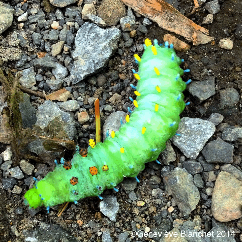 larve